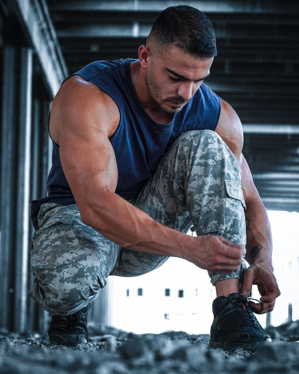 Daniyal.jpg